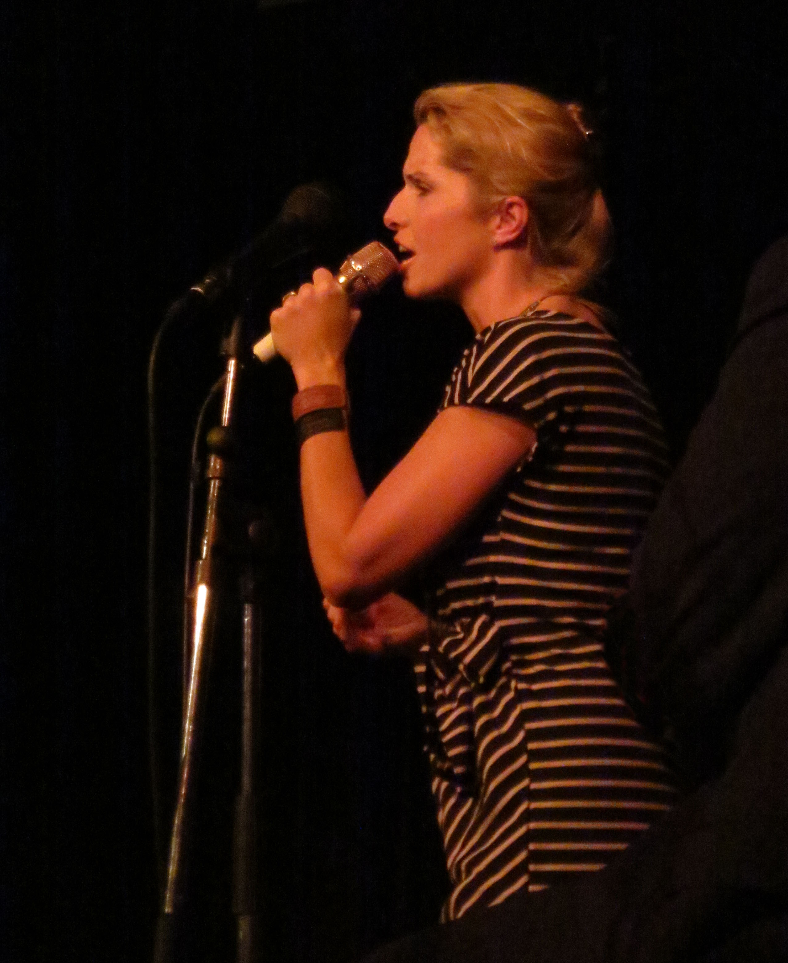 Viktoria Tolstoy uppträder vid Skottvångs gruva, 17 november 2012.